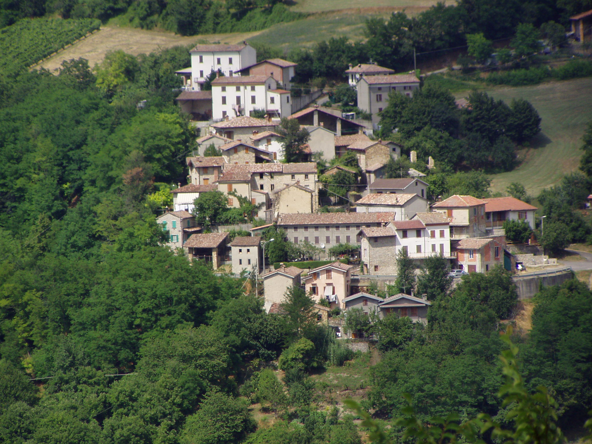 Pecorara, panorama di Pecorara vecchia.